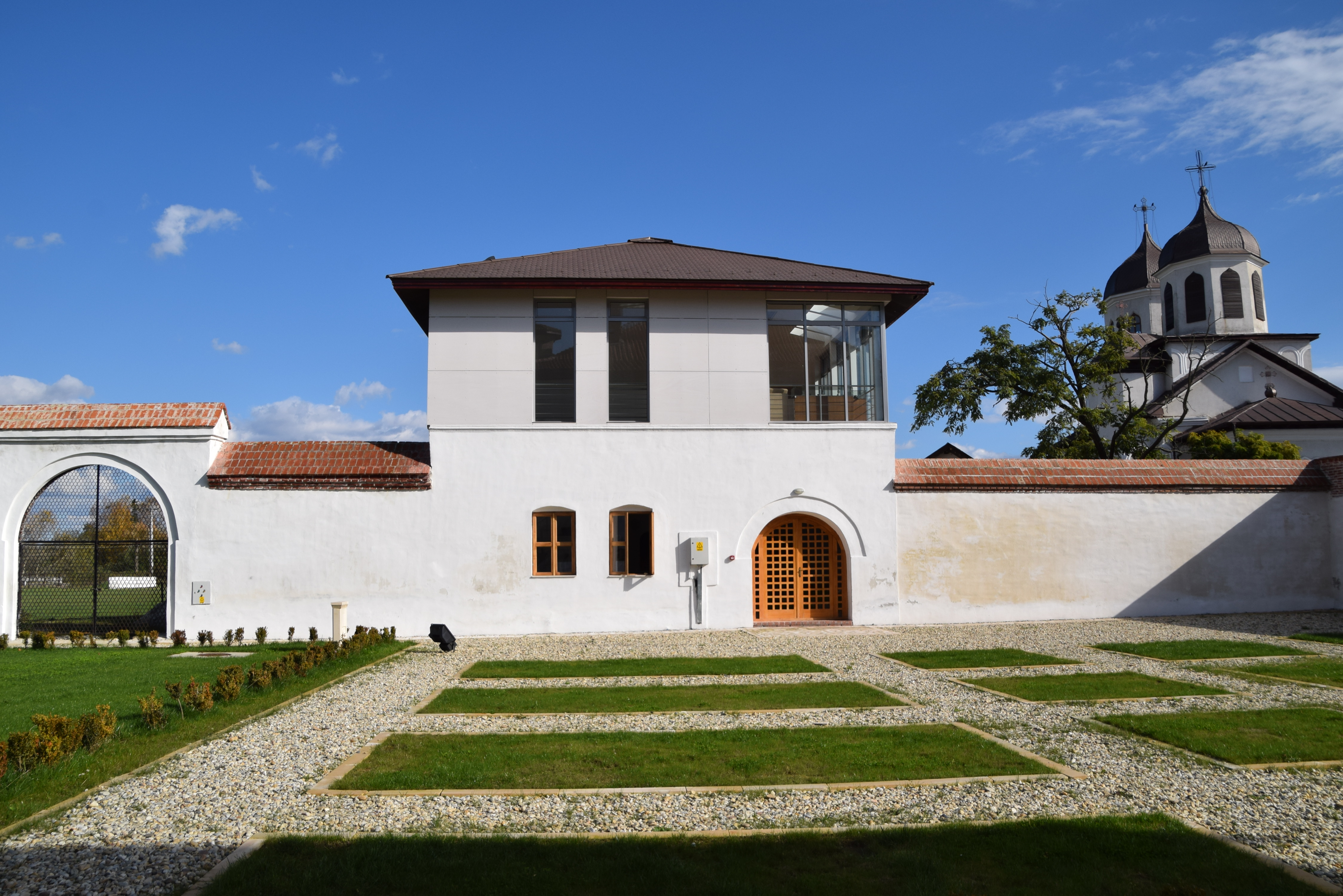 Ruinele casei vechi nu mai sunt vizibile, clădirea fiind reconstruită în timpul restaurării din 2014. 01